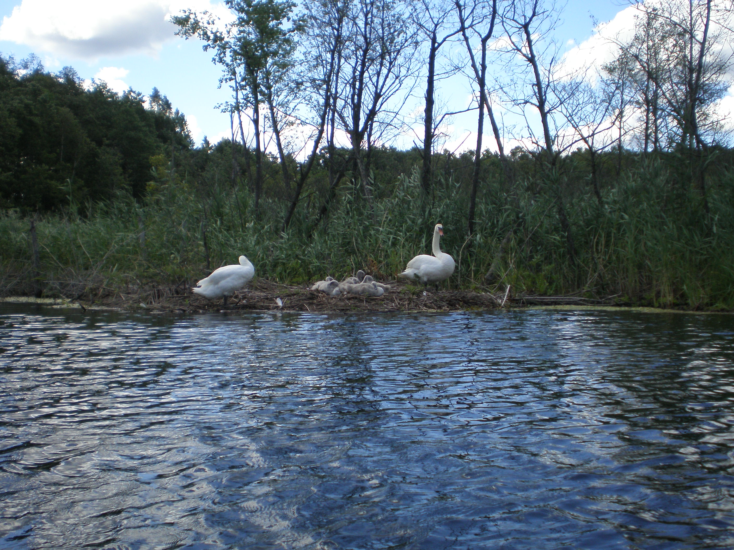 szlak kajakowy Czarna Hańcza